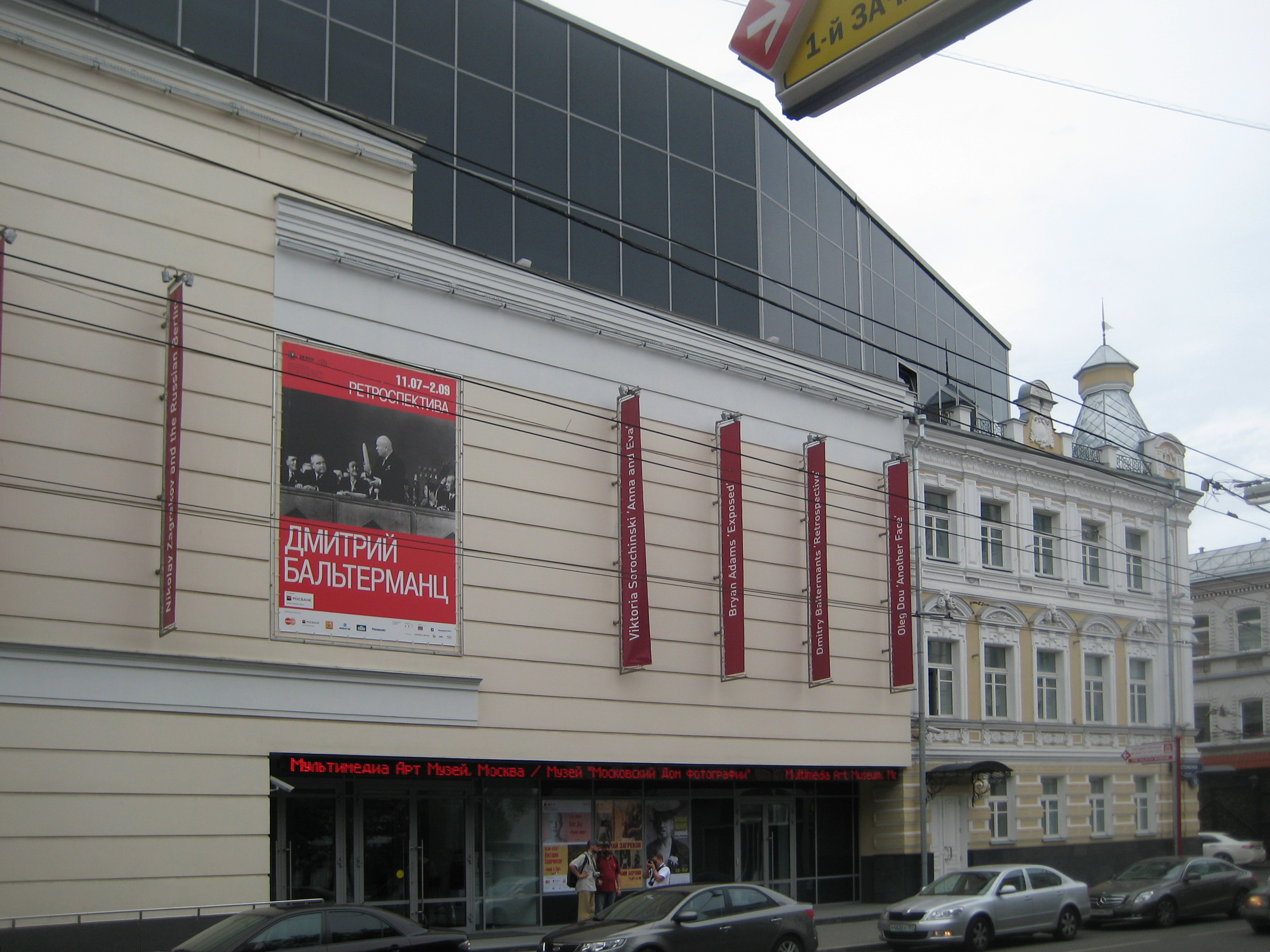 Остоженка